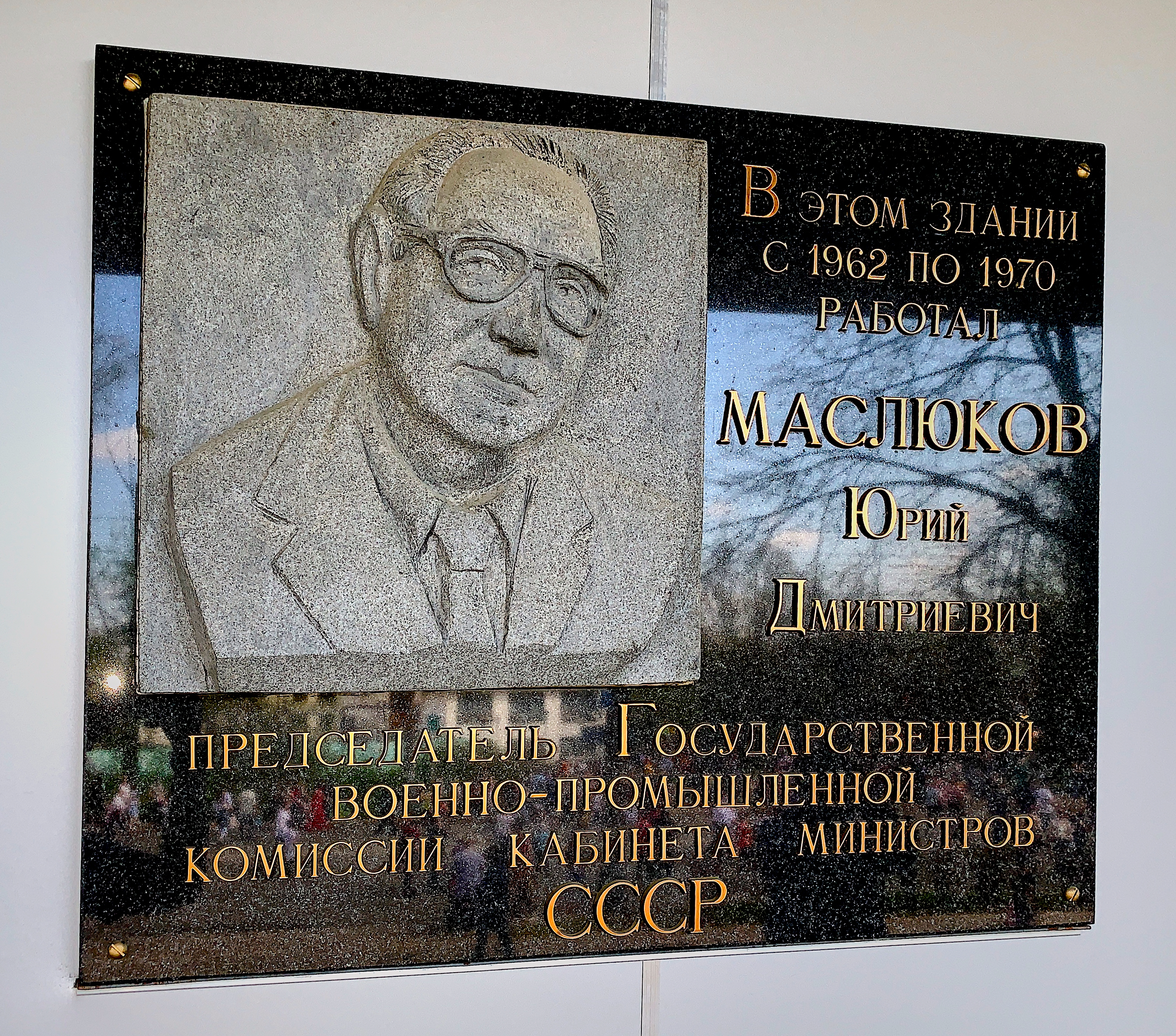 Памятная табличка Маслюкову Ю. Д. на входе в здание научно-исследовательского технологического института "Прогресс" в Ижевске (Пушкинская ул., 268)